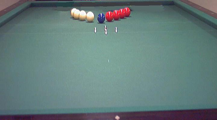 elaborazione grafica con paintbrush del gioco delle boccette